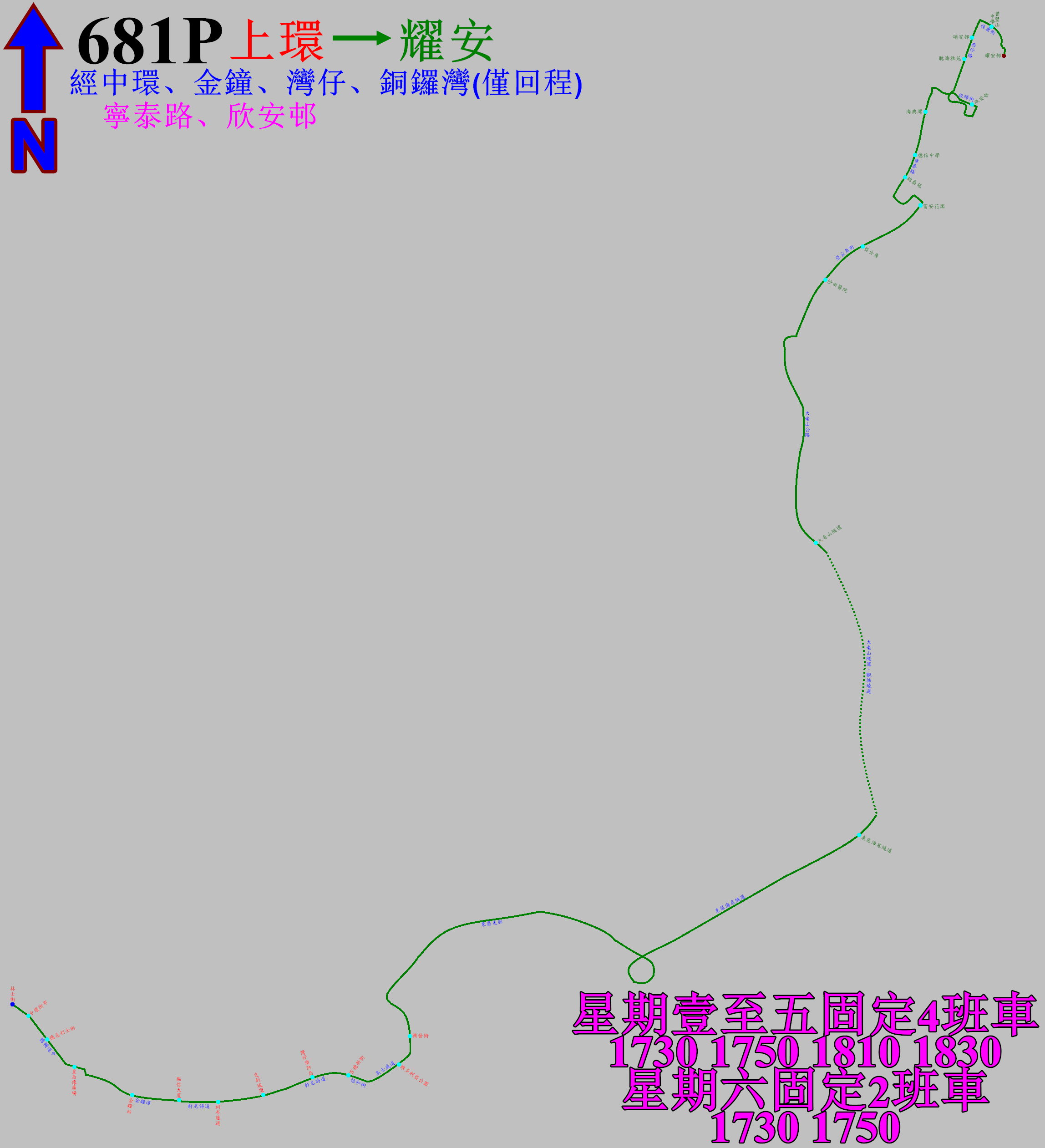 中文（香港）: 過海隧巴681P線馬鞍山方向的走線圖